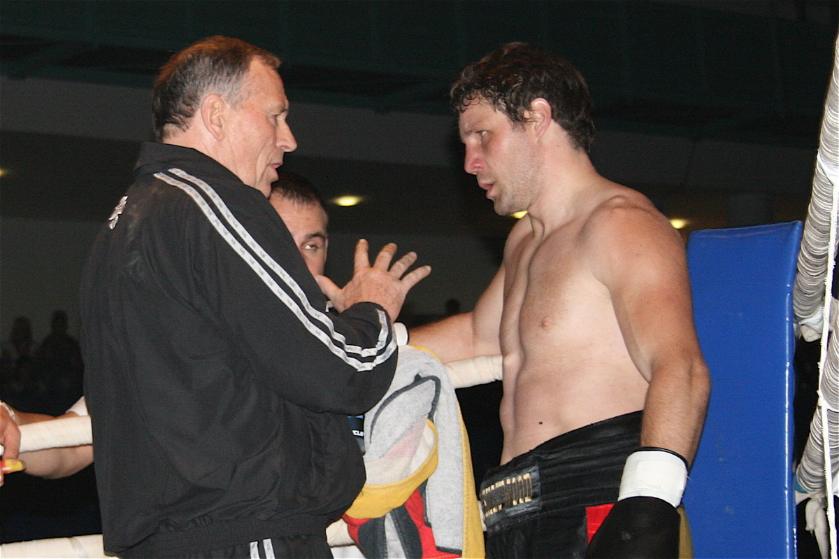 Boxer Steven Küchler mit Trainer Hans-Jürgen Witte in der Brandbergehalle Halle